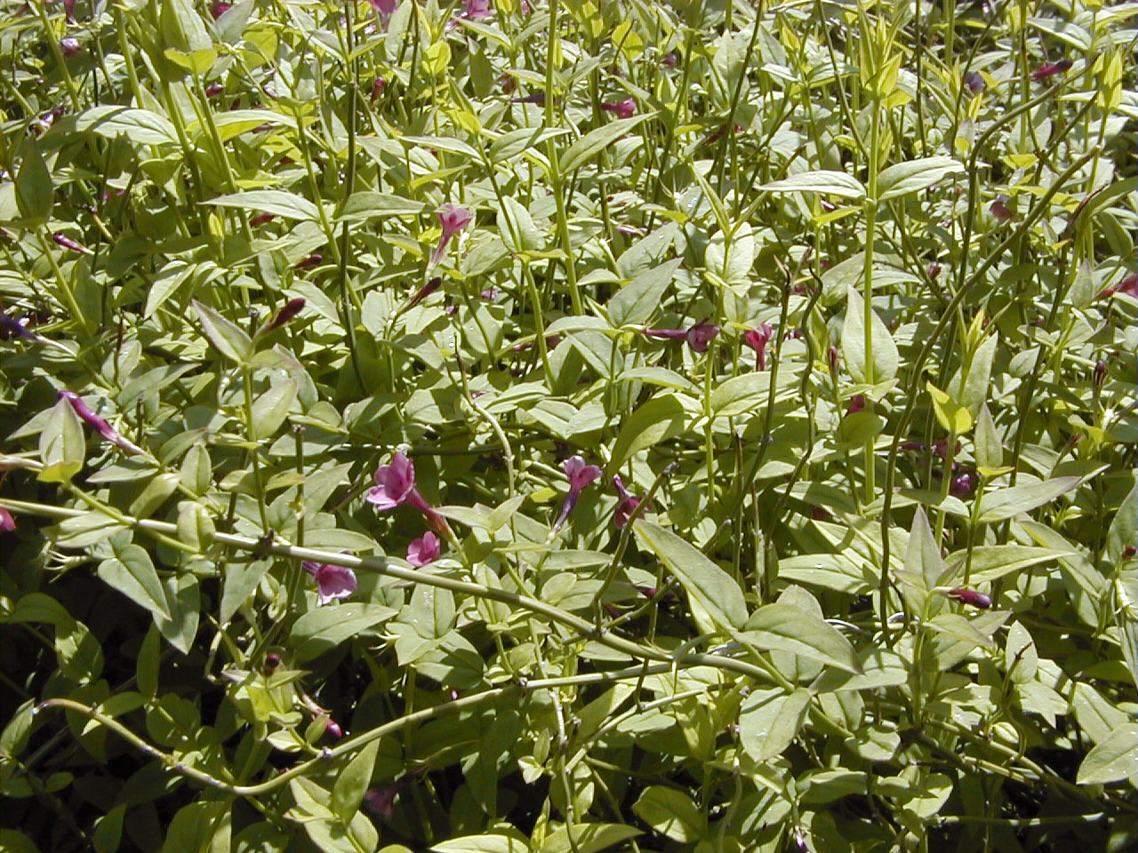 Jasminum beesianum. Real Jardín Botánico, Madrid